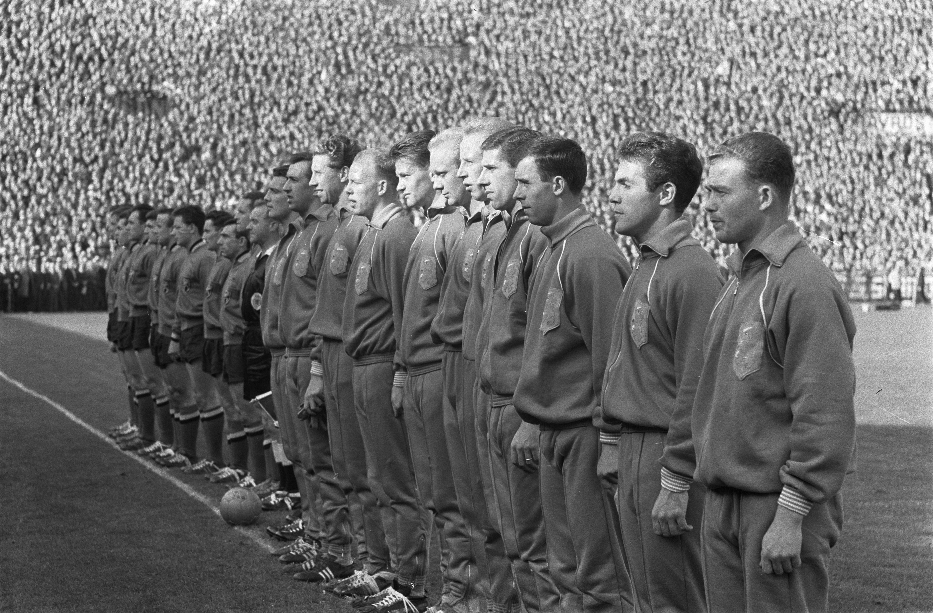 Collectie / Archief : Fotocollectie Anefo Reportage / Serie : [ onbekend ] Beschrijving : Voetbal Belgie tegen Nederland 1-4 te Antwerpen, De elftallen bij het spele van de volksliederen. Rechts het Nederlands elftal Annotatie : Vlnr. Cor van der Hart, Eddy Pieters Graafland, Jan Klaasses, Roel Wiersma, Kees Kuijs, Piet Kruiver, Henk Groot, Cor van der Gijp, Coen Moulijn,Bennie Muller, Piet van der Kuil Datum : 2 oktober 1960 Locatie : Antwerpen Trefwoorden : elftallen, sport, voetbal Fotograaf : Pot, Harry / Anefo Auteursrechthebbende : Nationaal Archief Materiaalsoort : Negatief (zwart/wit) Nummer archiefinventaris : bekijk toegang 2.24.01.05 Bestanddeelnummer : 911-6400